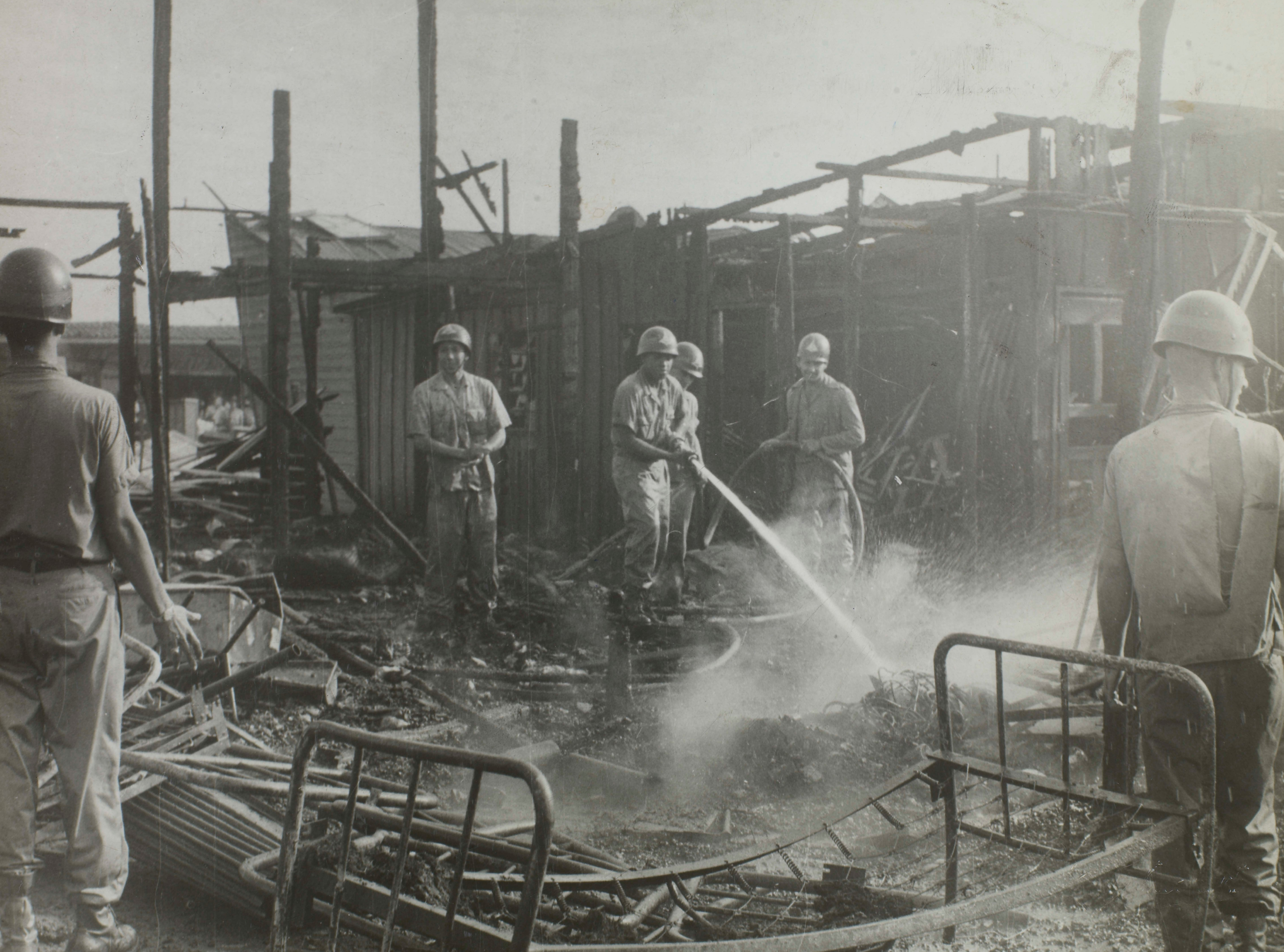 Fotografia do Fundo Correio da Manhã, sob a guarda do Arquivo Nacional.